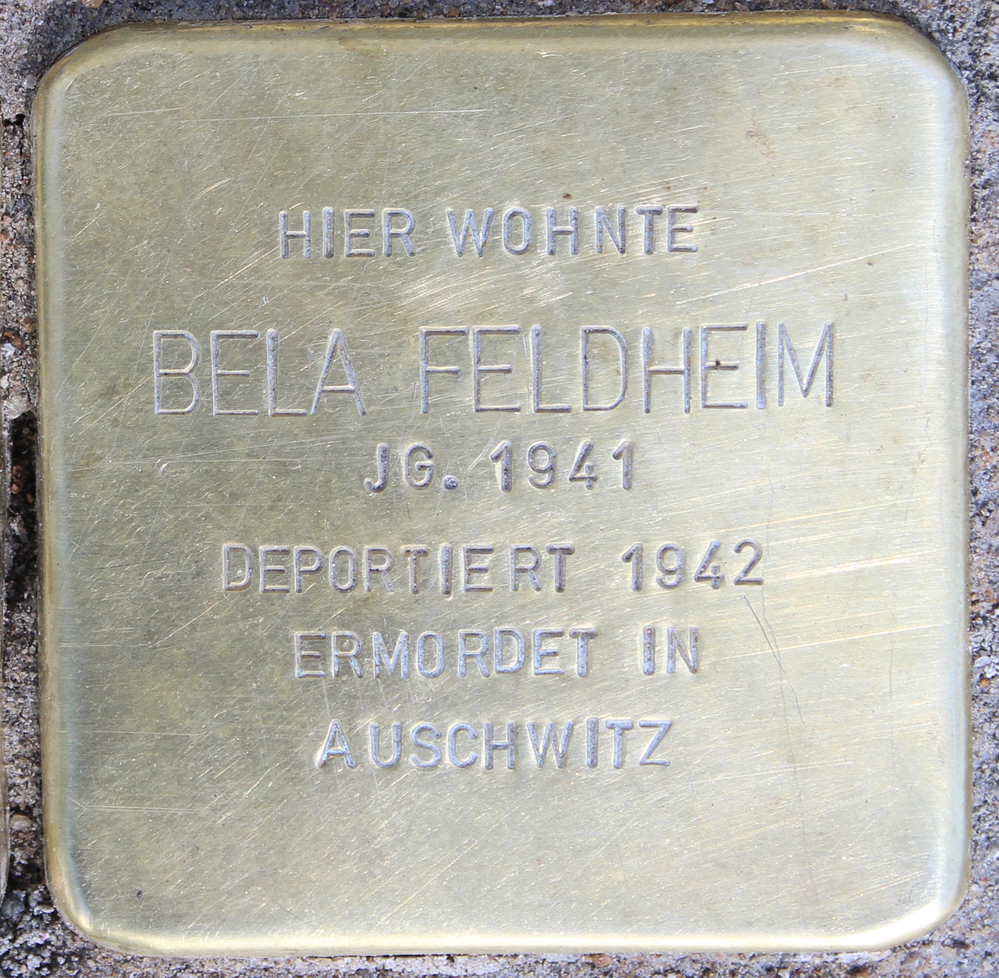 Stolperstein für Bela Feldheim